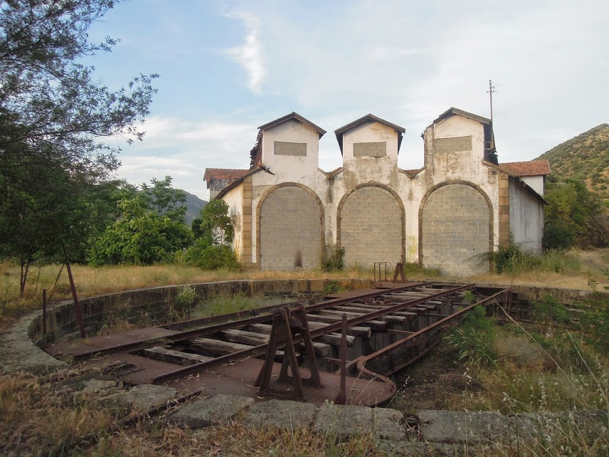 Ehemaliger Bahnhof von Barca d'Alva, Portugal